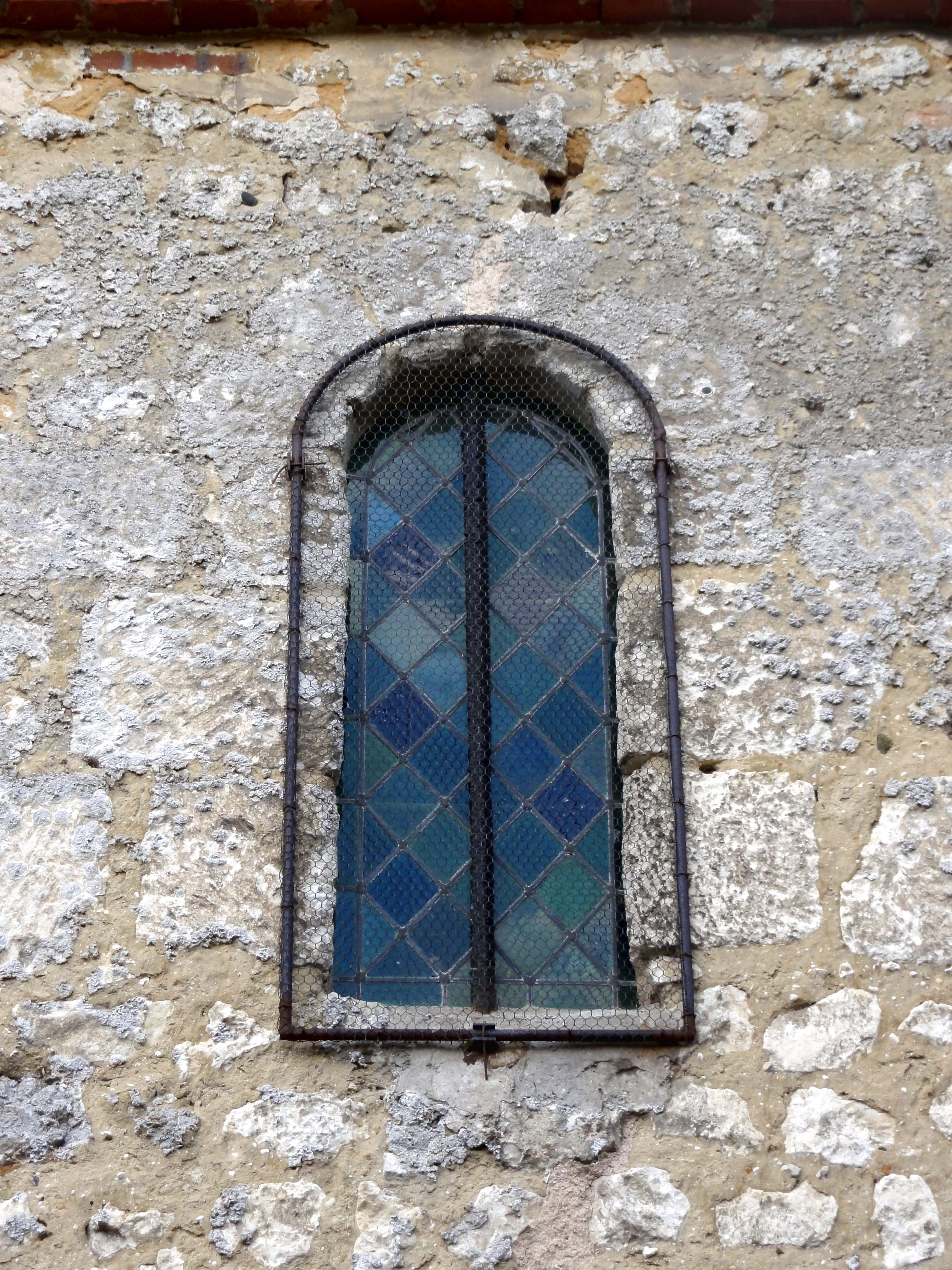 Église Saint-Lucien de Warluis - voir titre.